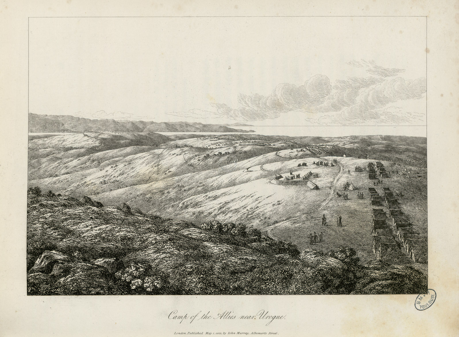 25 gravures sur cuivre, 1 carte dessinée et gravée par B. R. Baker, imprimée par Rowney et Forster, lettre par J. Netherclift. - Toutes portent la mention : London, published May 1823, by John Murray, Albemarle Street. Il existe une traduction française, dactylographiée, réalisée par Renée Fourcade et déposée au Musée Basque de Bayonne. Ancely, René (1876 - 1966). Possesseur